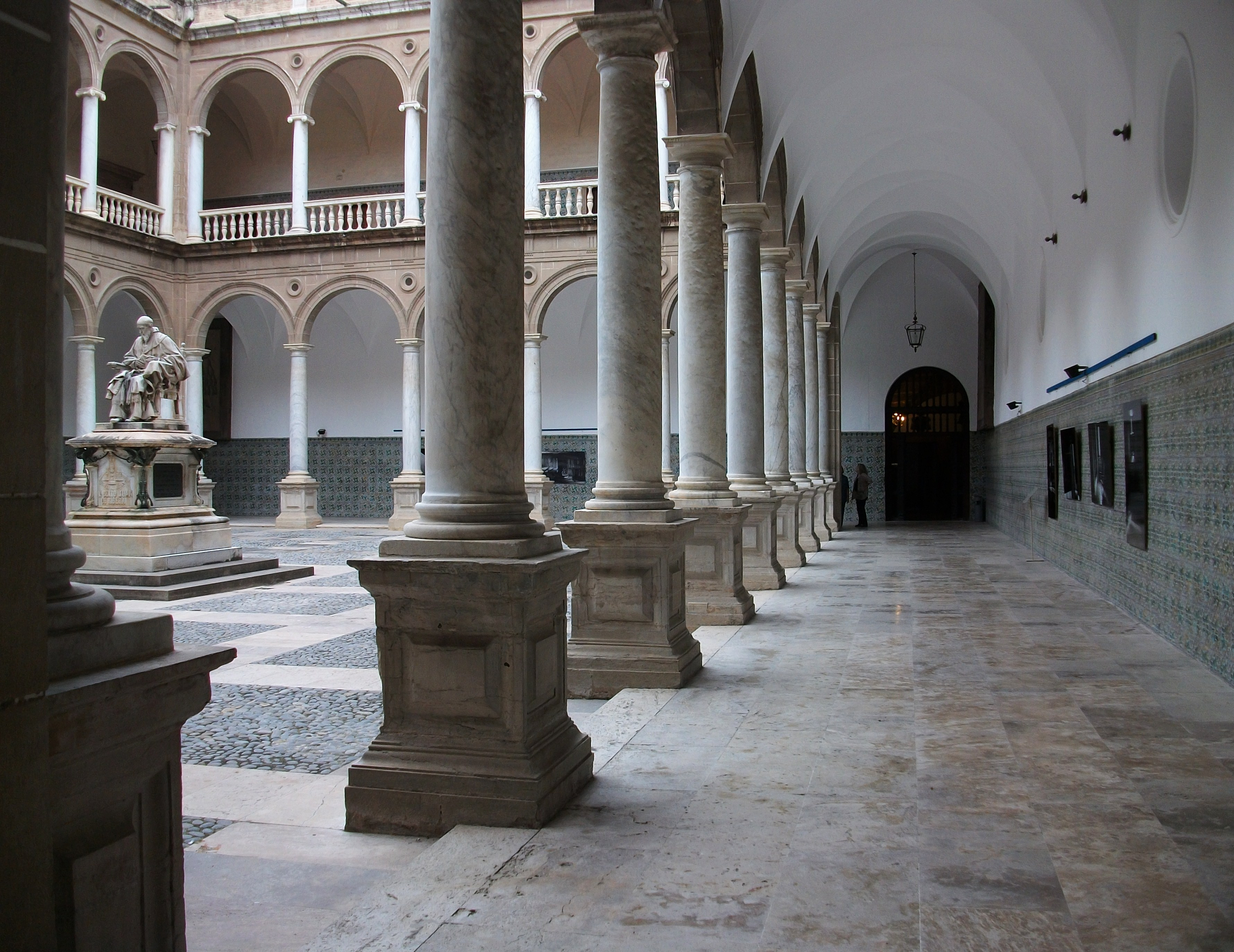 Cloister of the Col·legi del Corpus Christi de València.